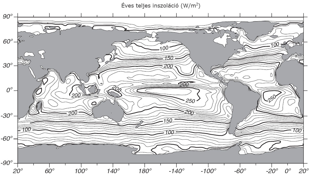 Óceán hőháztartás_2